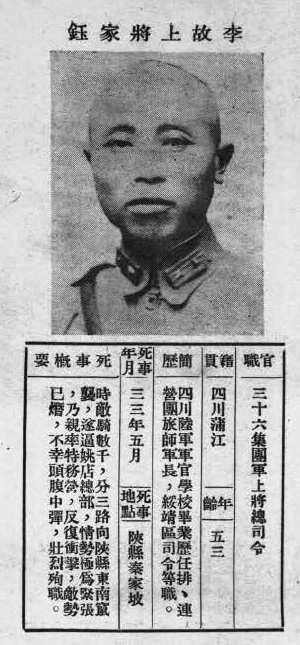 中文（台灣）: 抗戰軍人忠烈錄第一輯中的烈士遺像